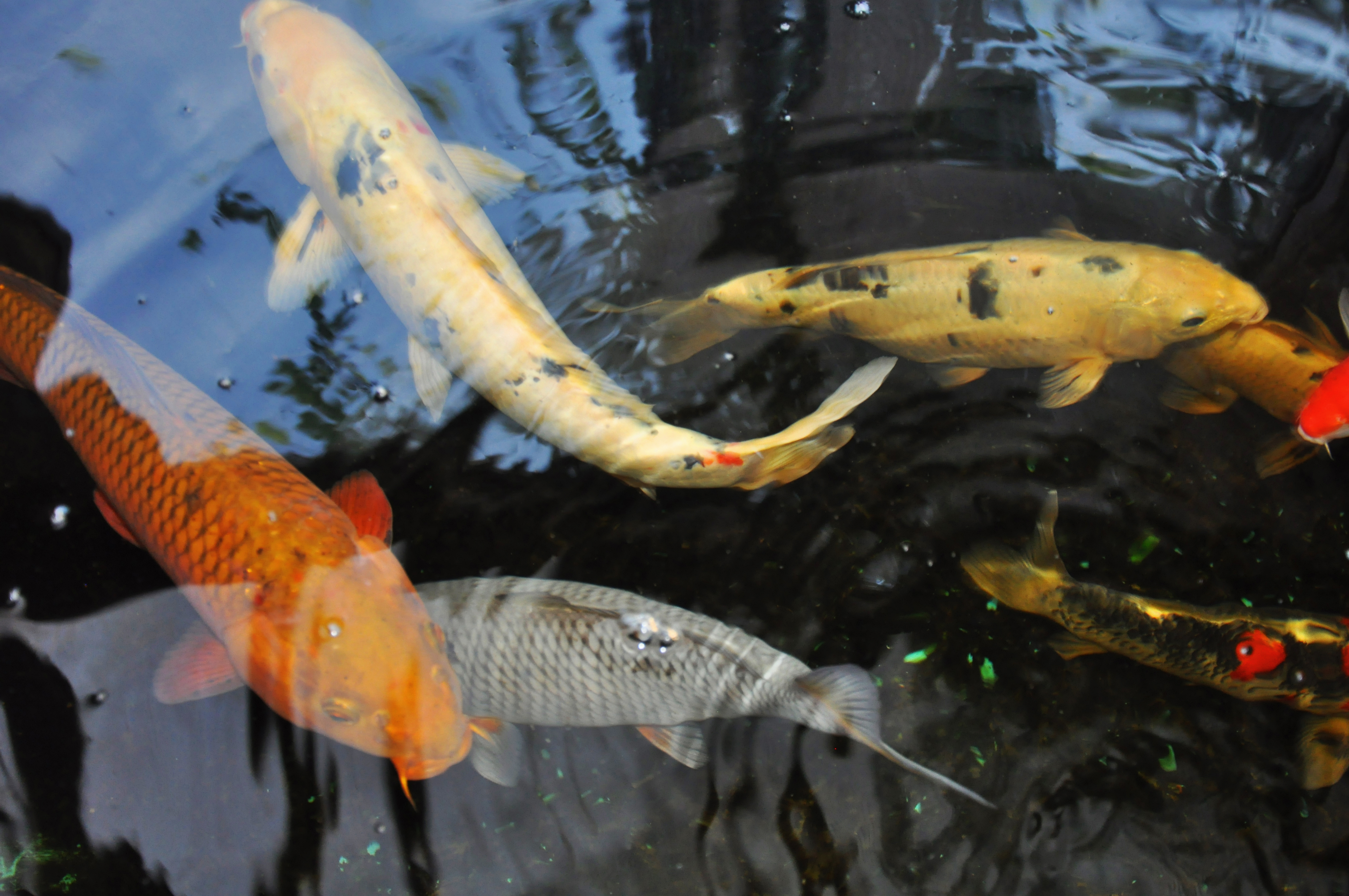 Japonské okrasné ryby - Koi Kapři, jeseteři, karasi...